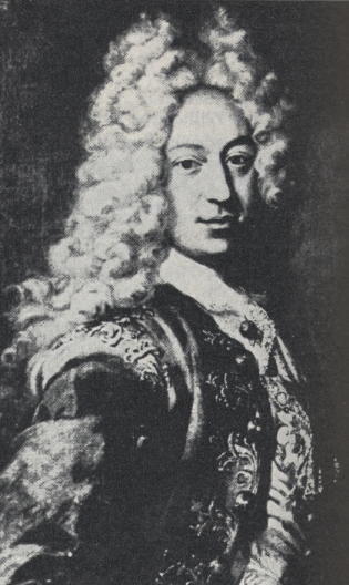 Bildnis Friedrich Ernst von Fabrice (1683–1750)